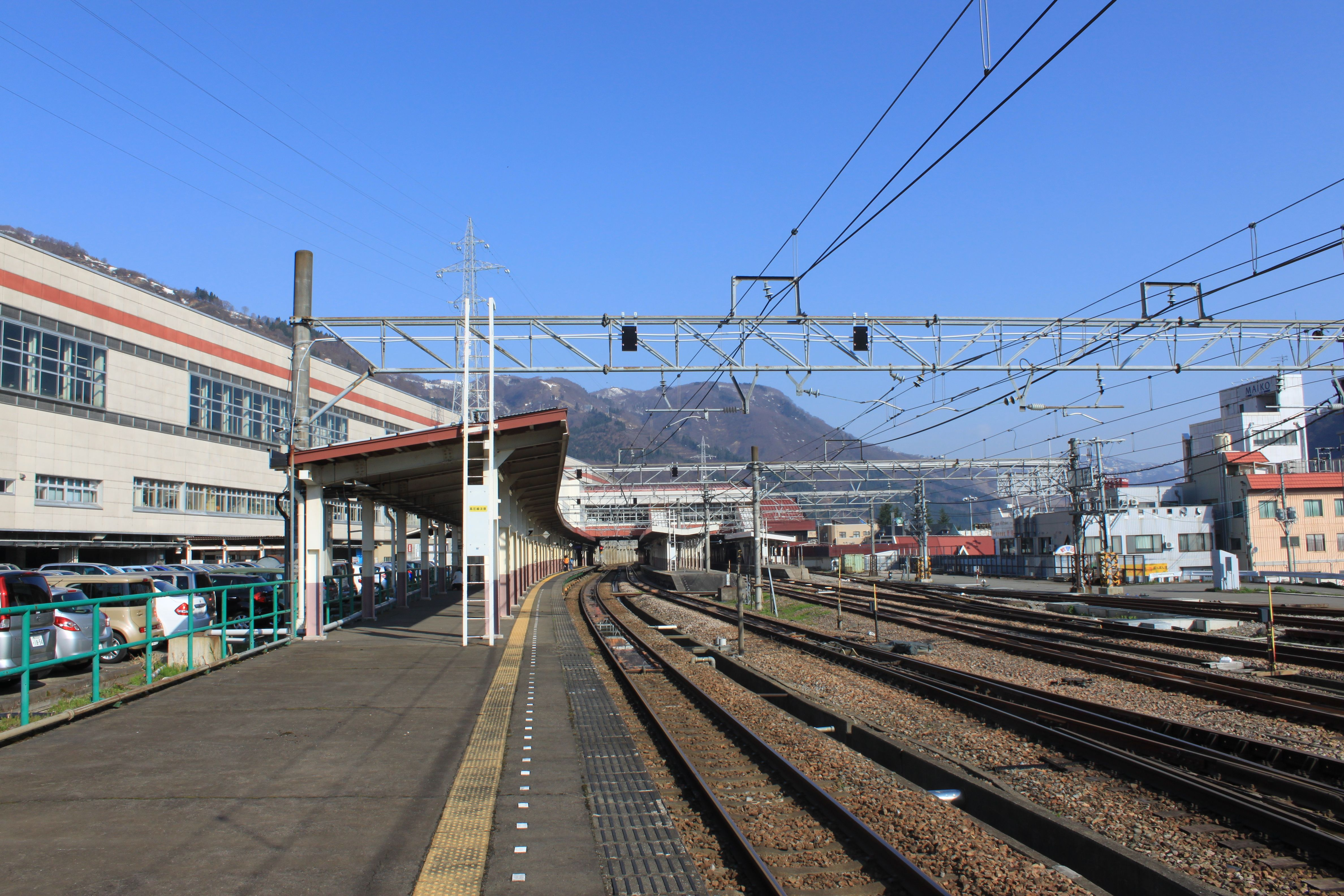 越後湯沢駅